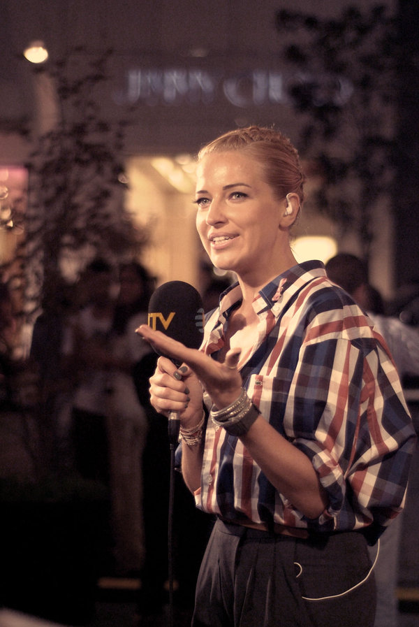 burcu esmersoy by mustafa soydan ..fno istanbul istinye park